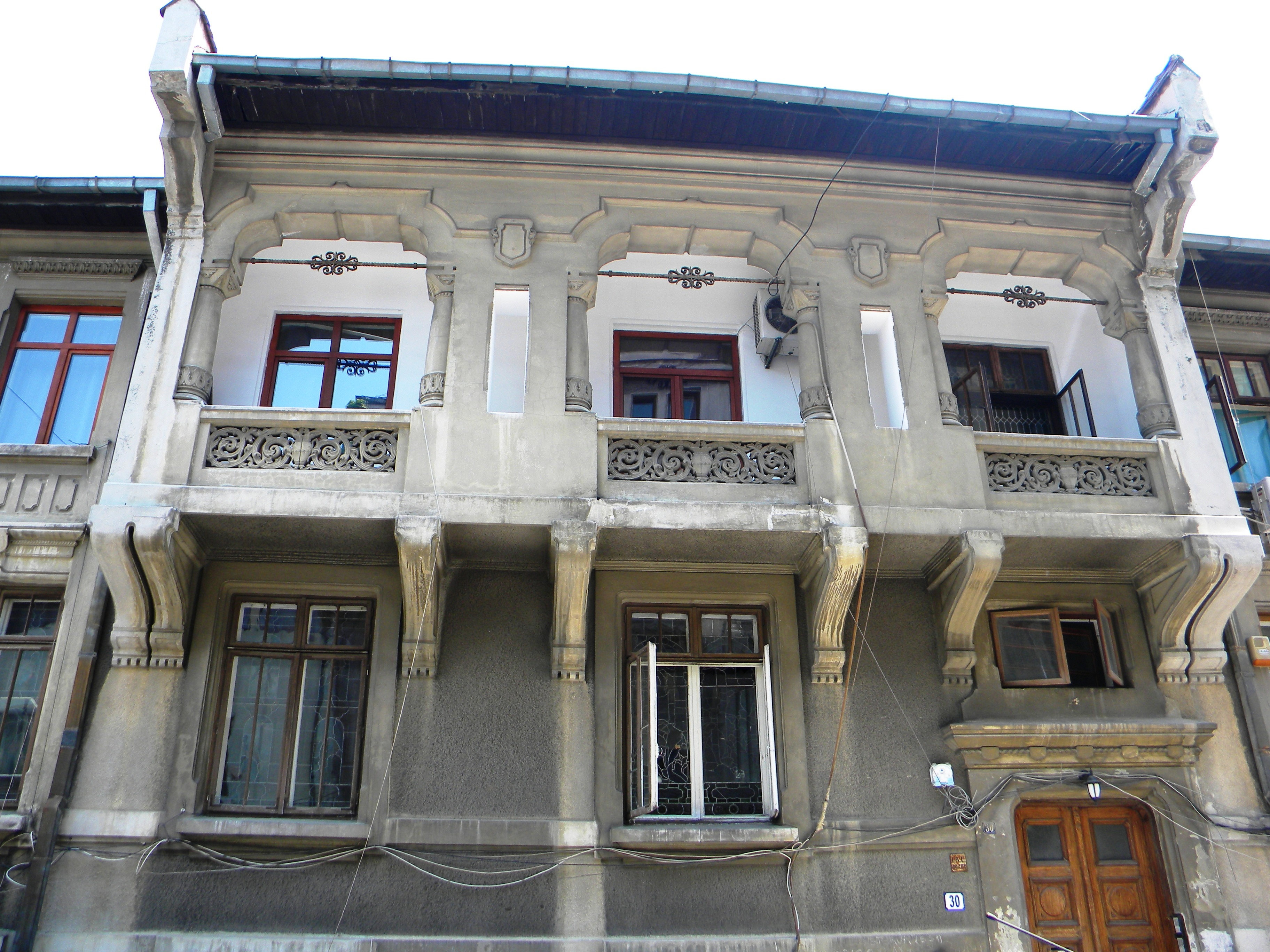 Imobil, Str. Theodor Aman nr. 30, Bucuresti sect. 1